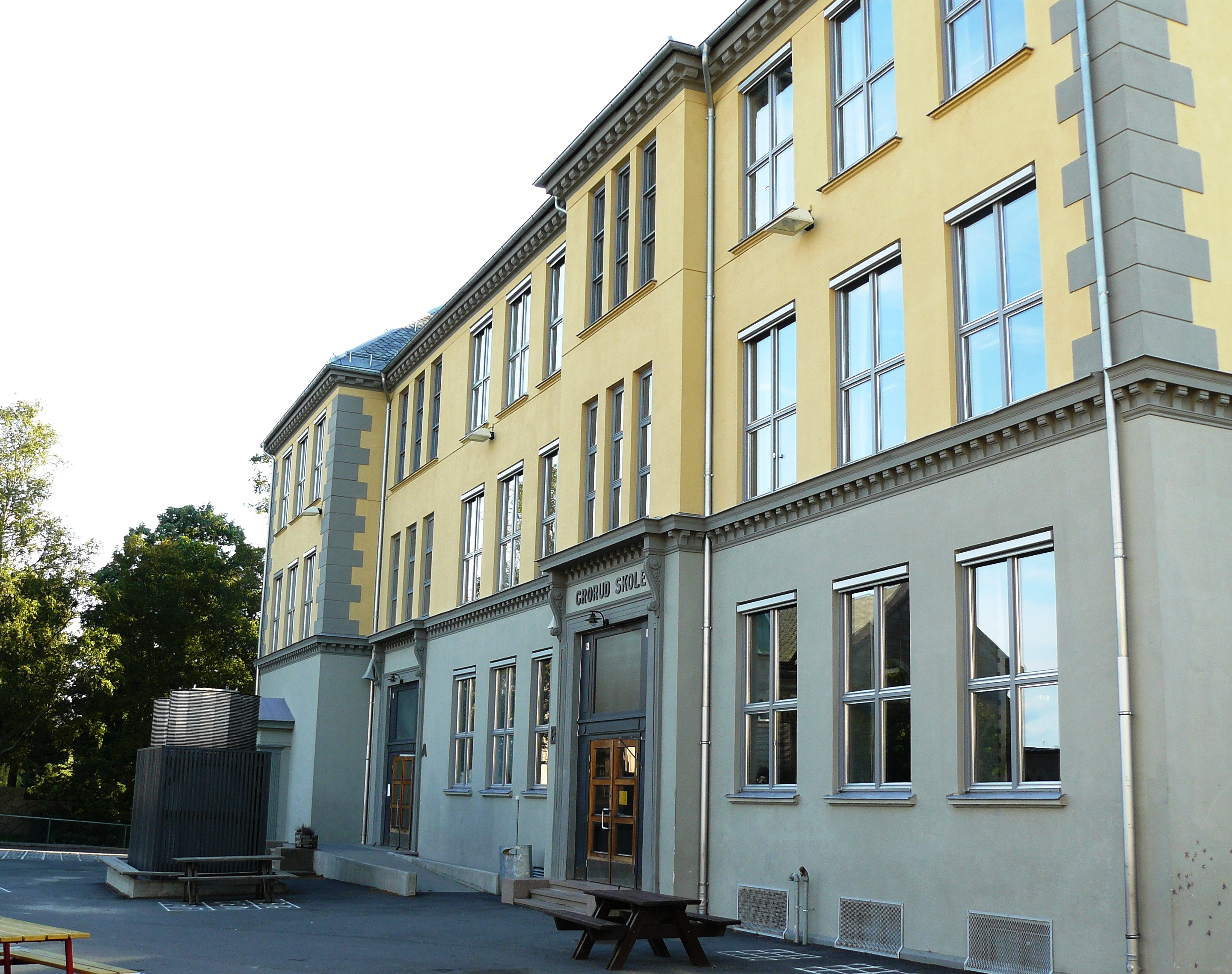 Grorud school, Oslo